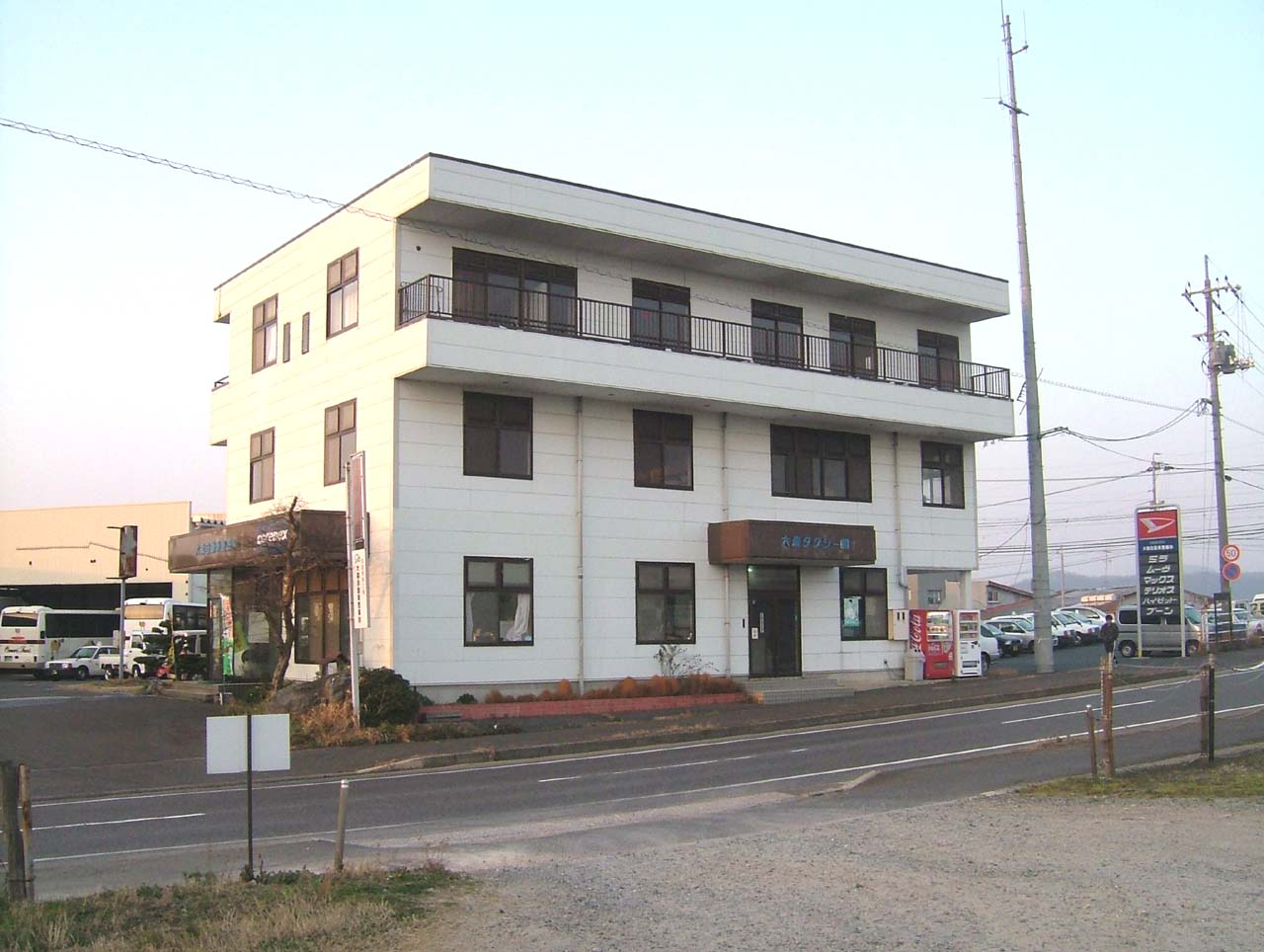 大森タクシー (鳥取県)